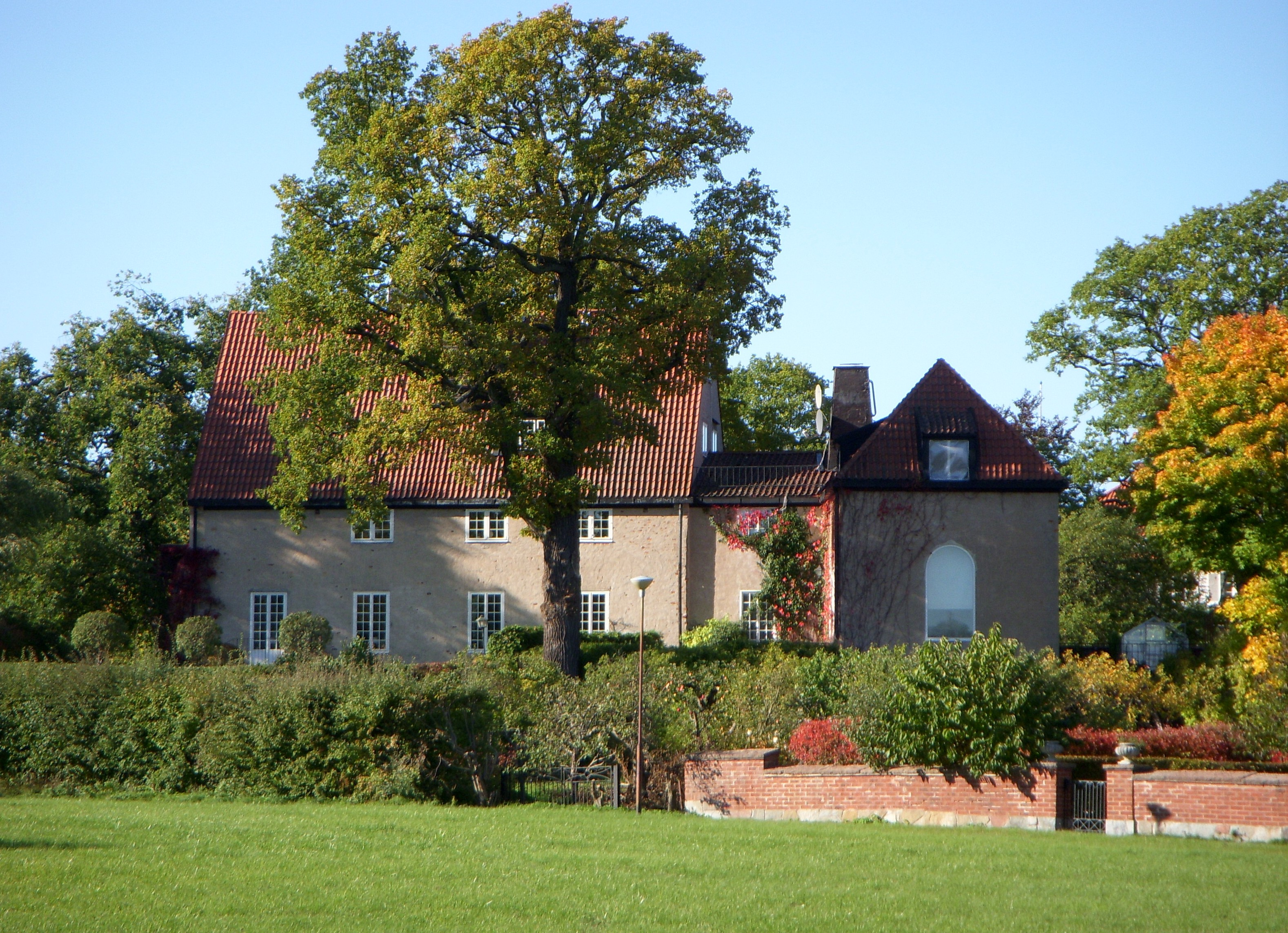 "Villa Lagerkrantz" i Danderyd